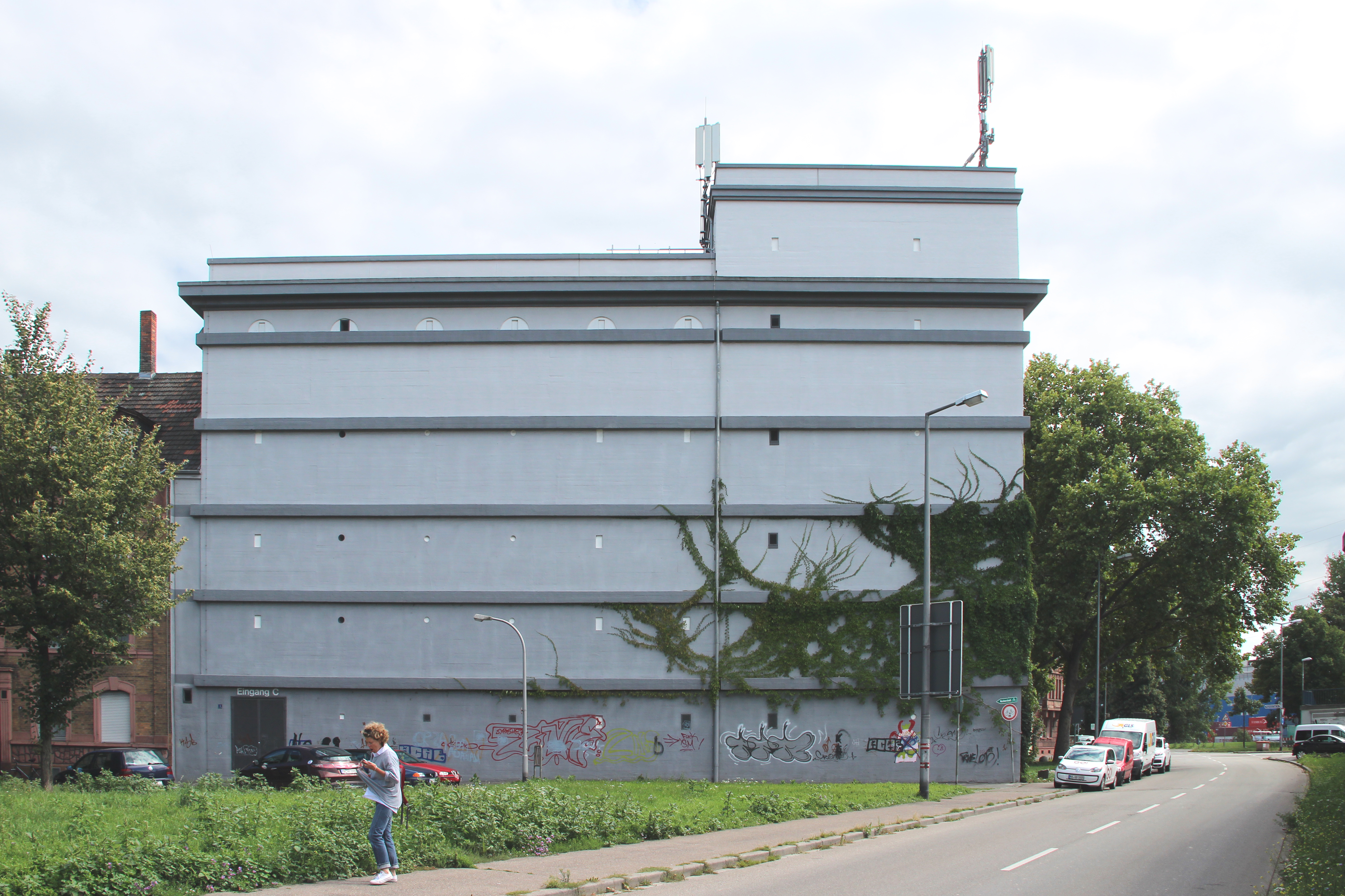 Bildinhalt: Ochsenpferchbunker in der Neckarstadt-West aus Nord-Westen Aufnahmeort: Mannheim, Deutschland